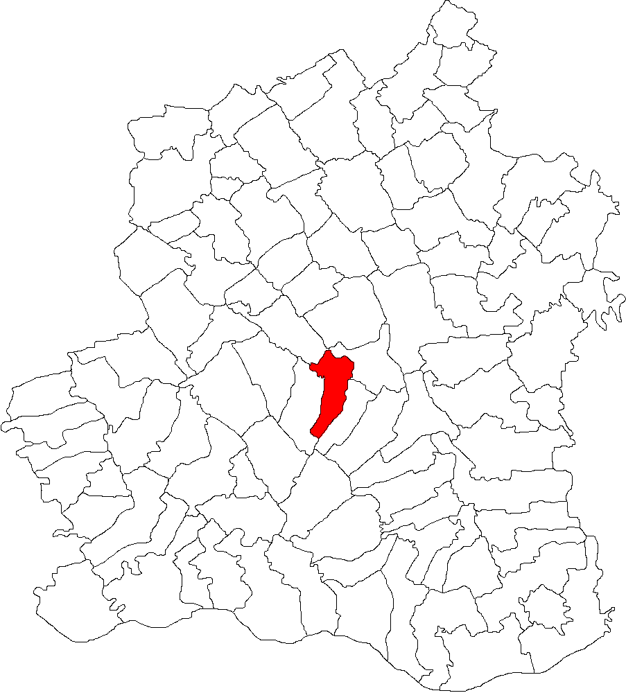 Categorie:Hărţi ale judeţului Teleorman